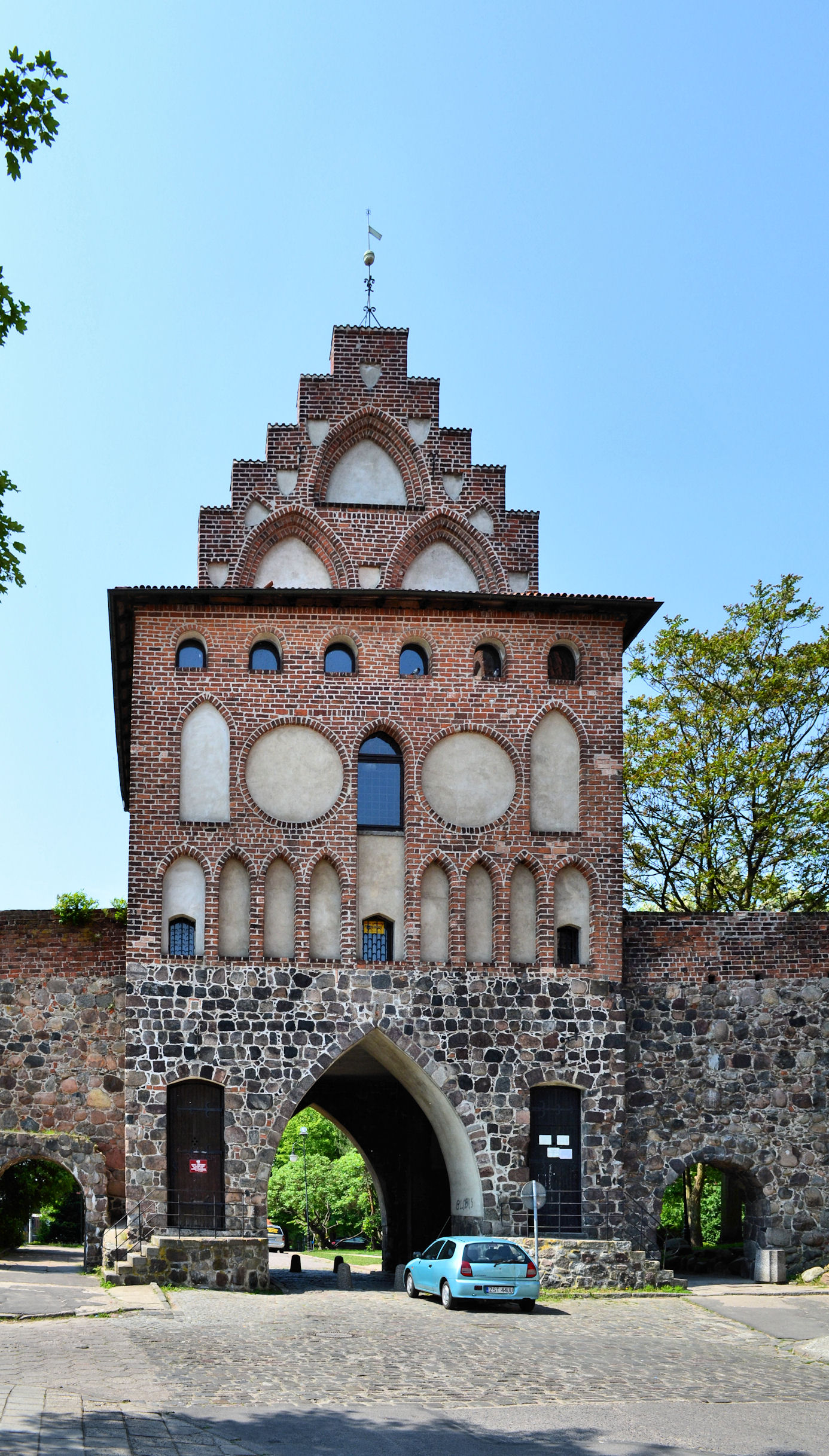 Brama Pyrzycka w Stargardzie Szczecińskim